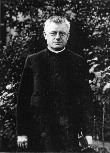 Pfarrer Johannes Schulz aus dem Bistum Trier, KZ-Häftling und NS-Opfer (+1942 in Dachau)